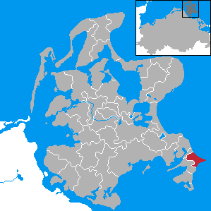 Göhren, Landkreis Rügen, Mecklenburg-Vorpommern